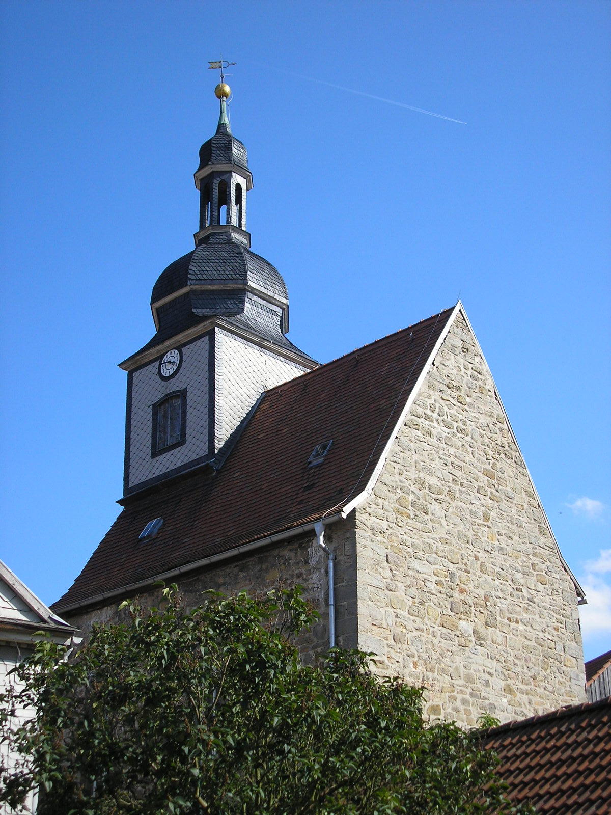 Die Dorfkirche von Kettmannshausen bei Ilmenau (Thüringen, Deutschland).